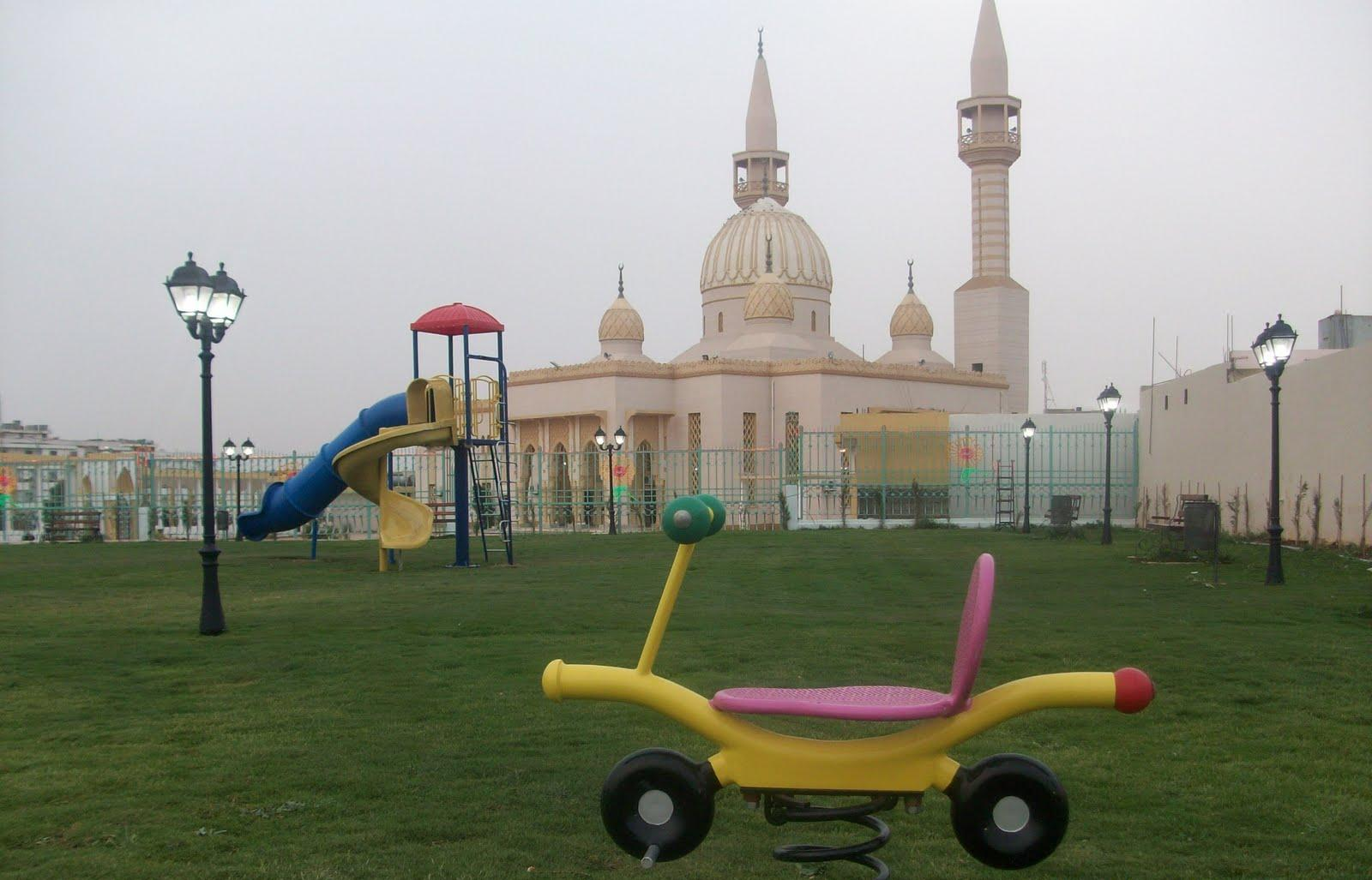 Garden Alotfil in Al Bayda city